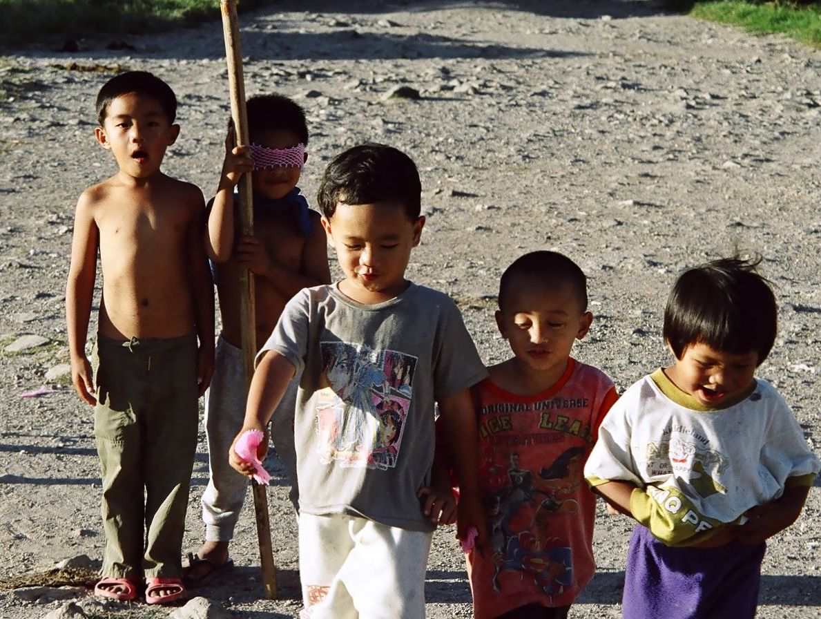 Sagada, Cordilleras, Philippines